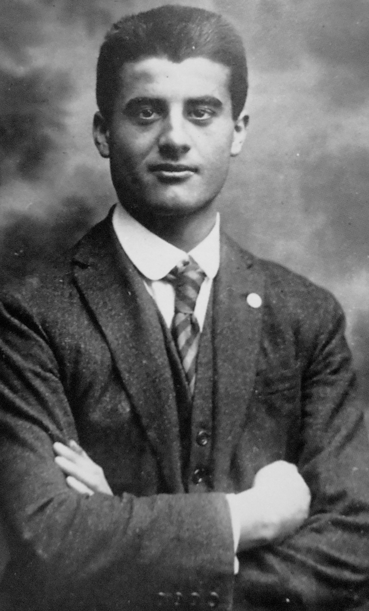 Pier Giorgio Frassati, les bras croisés d'après le livre une vie en image de Luciana Frassati